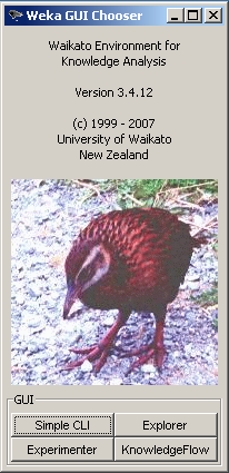 Weka Data Mining Open Software in Java